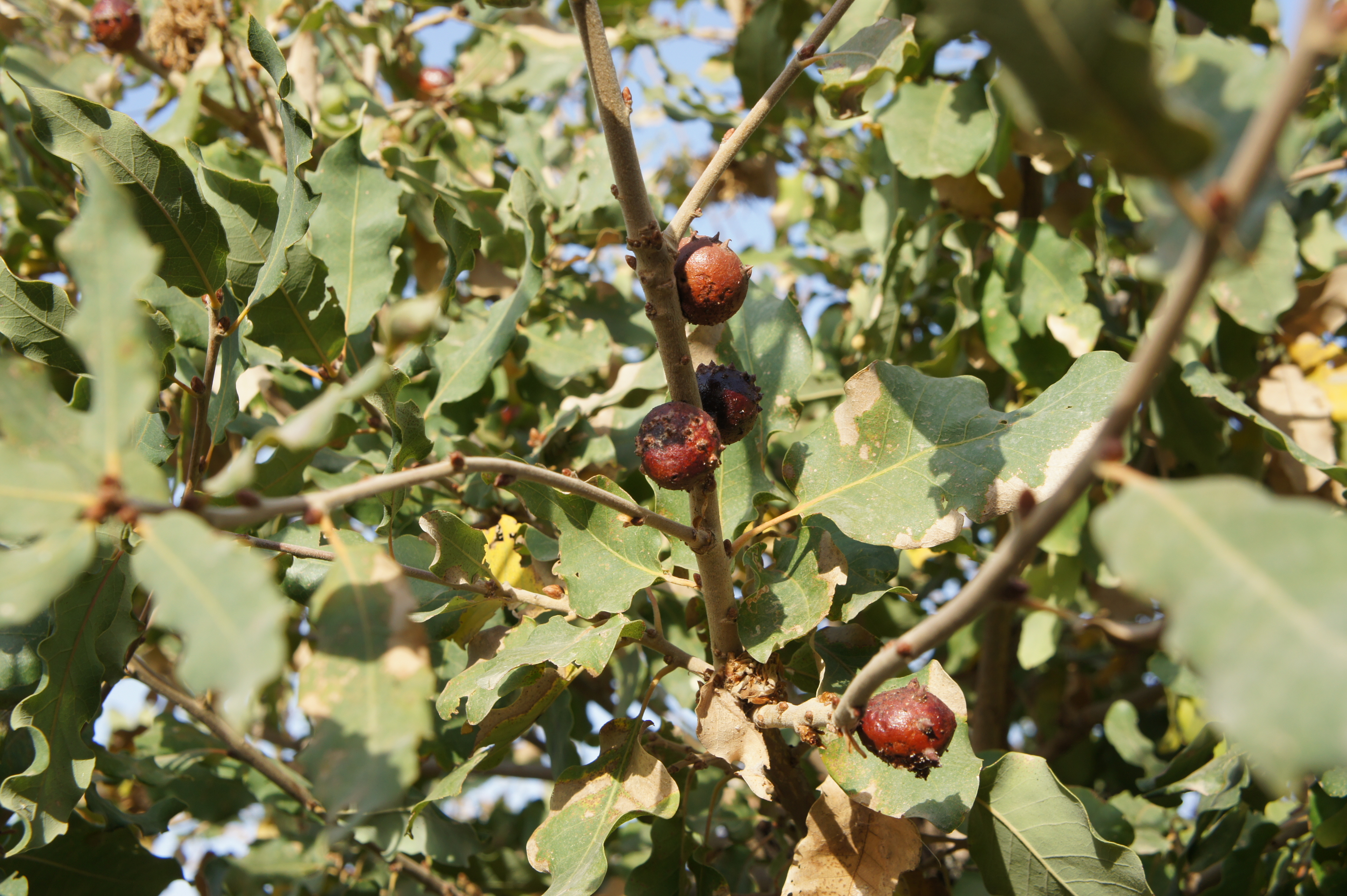 Kurdî: Shekalor (Andricus insanus), Dêrika Çiyayê Mazî.